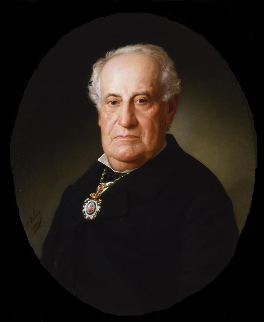 Retrato del pintor y dibujante español José María Avrial y Flores (1807-1891).